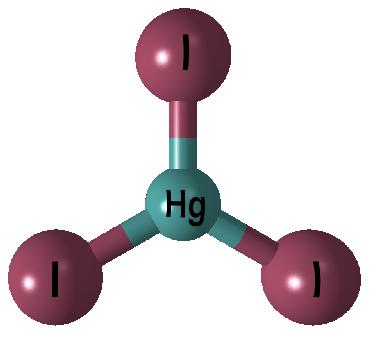 Trijodidortuťnatý anion